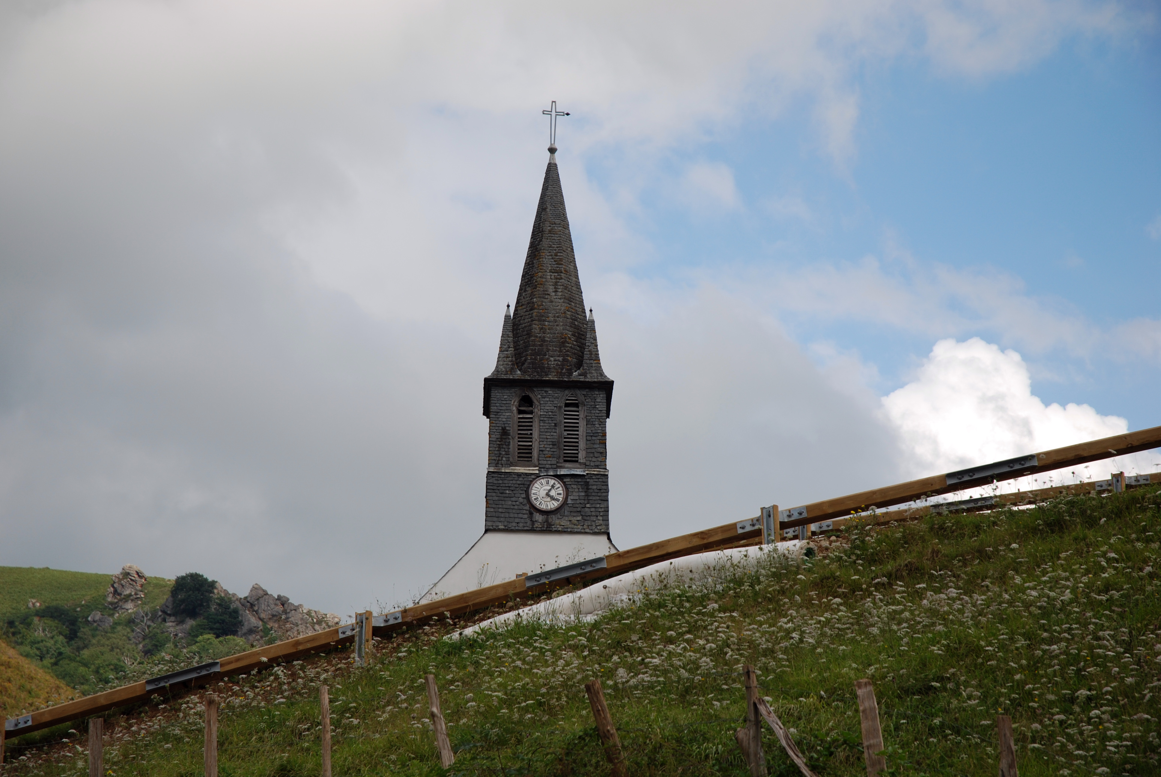 Estérençuby, clocher de l'église Notre-Dame